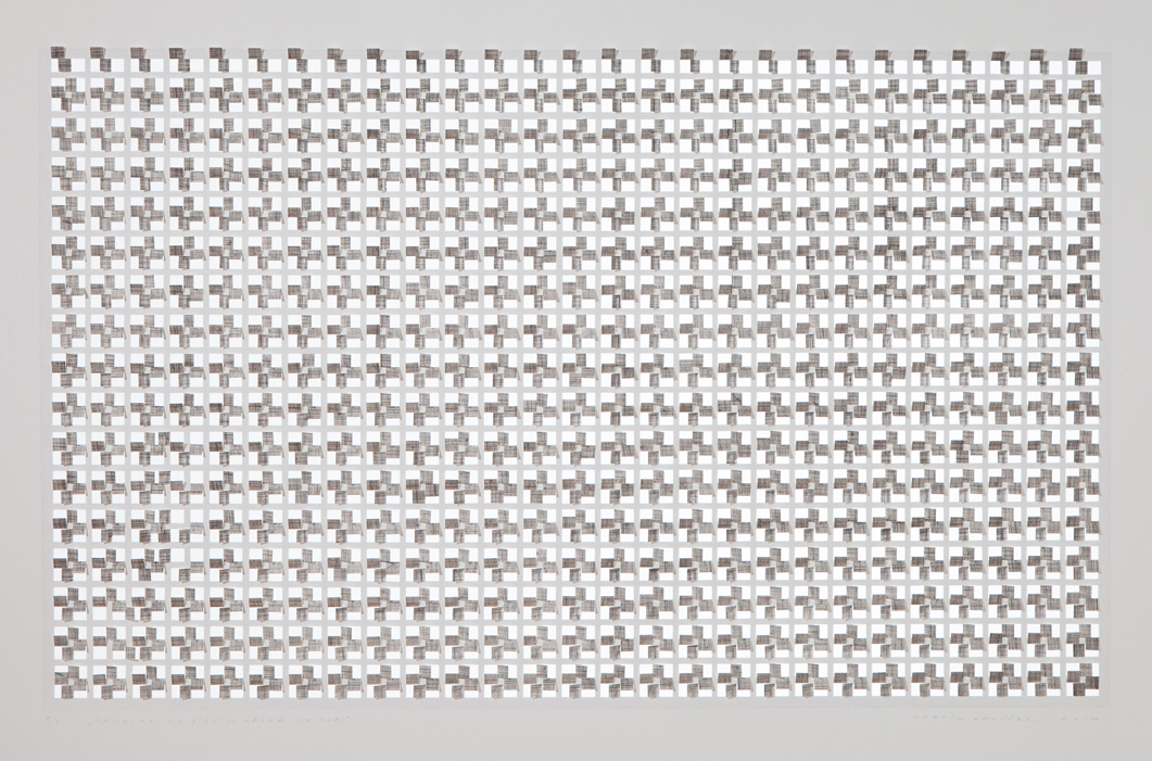 Martin Velíšek, Paneláky na Jižním Městě, 2015, hlubotisk, 70 x 100 cm